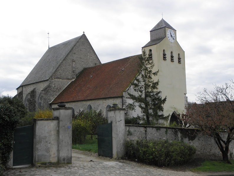 Église Saint-Crépin-et-Saint-Crépinien de Verdelot (Seine-et-Marne, région Île-de-France)..